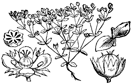 Slika 213. Pritlični lan. (Línum Radíola.) [sic!]